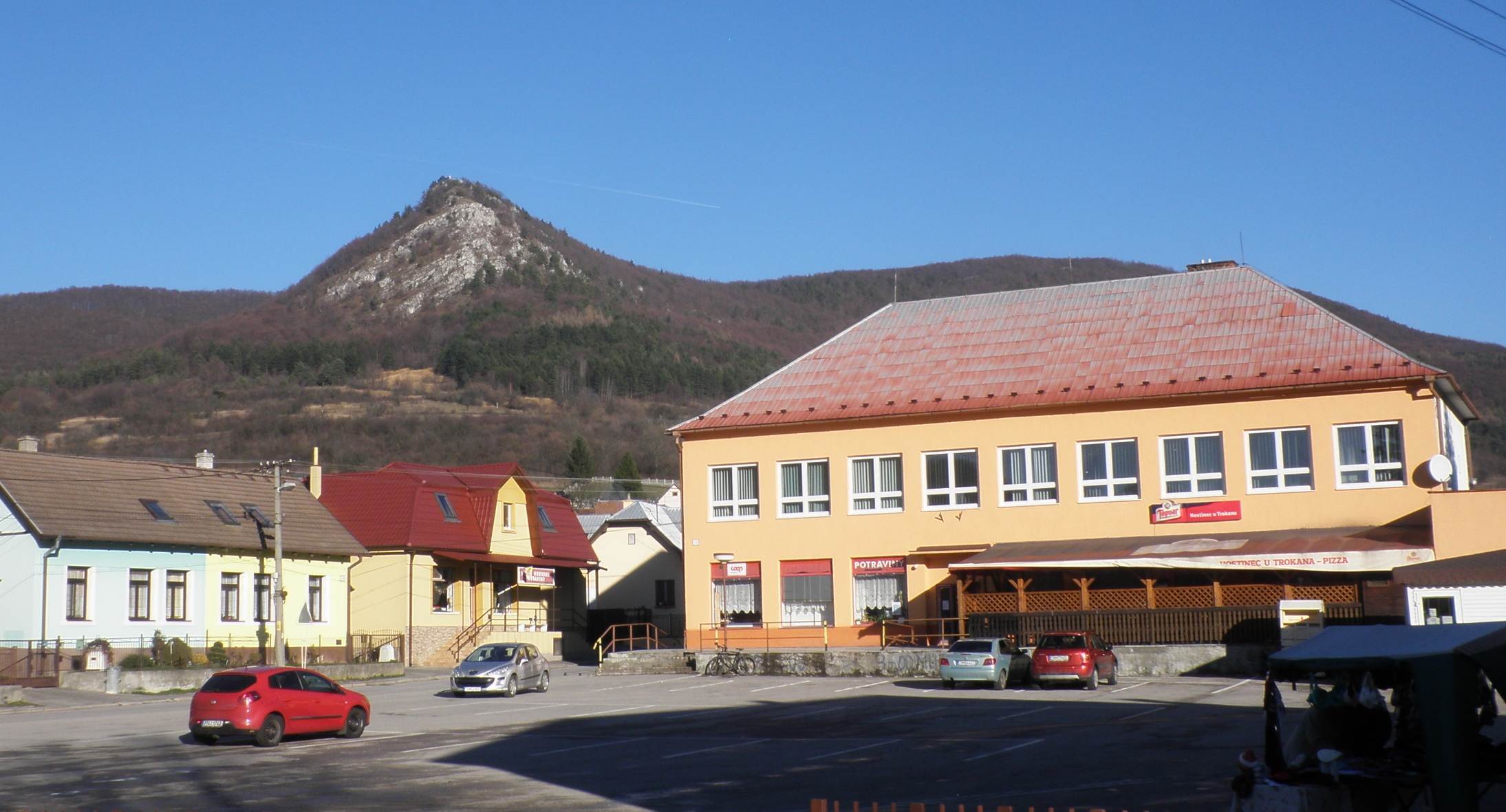 Omšenie